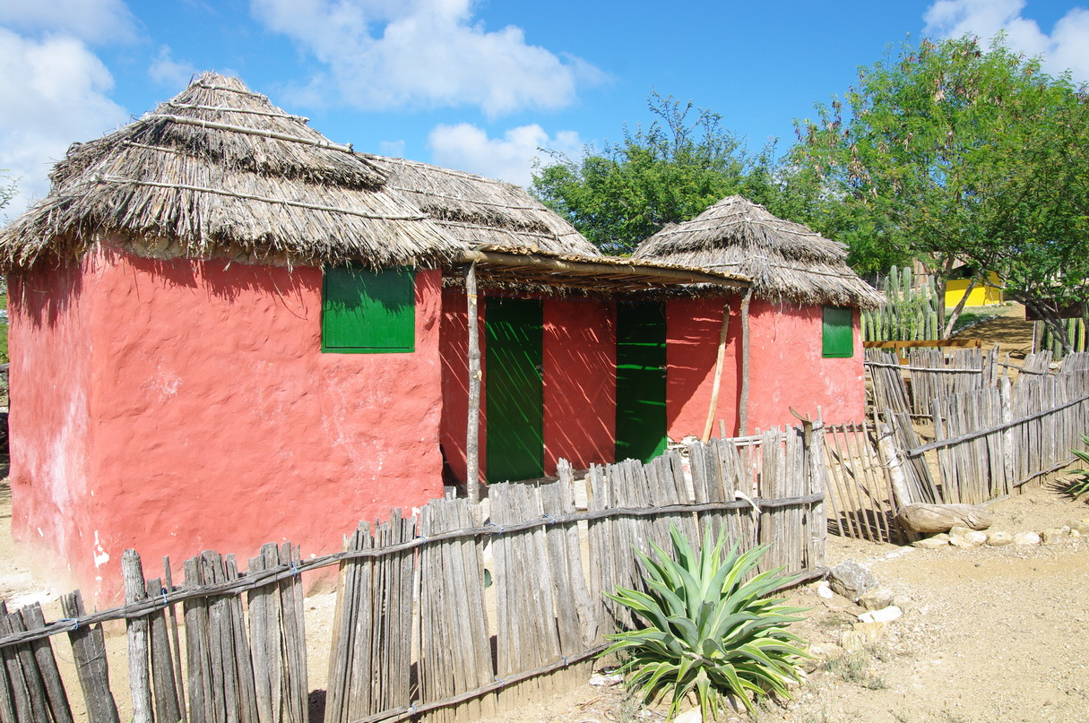 Mangasina di Rei, Rincon, Hütte